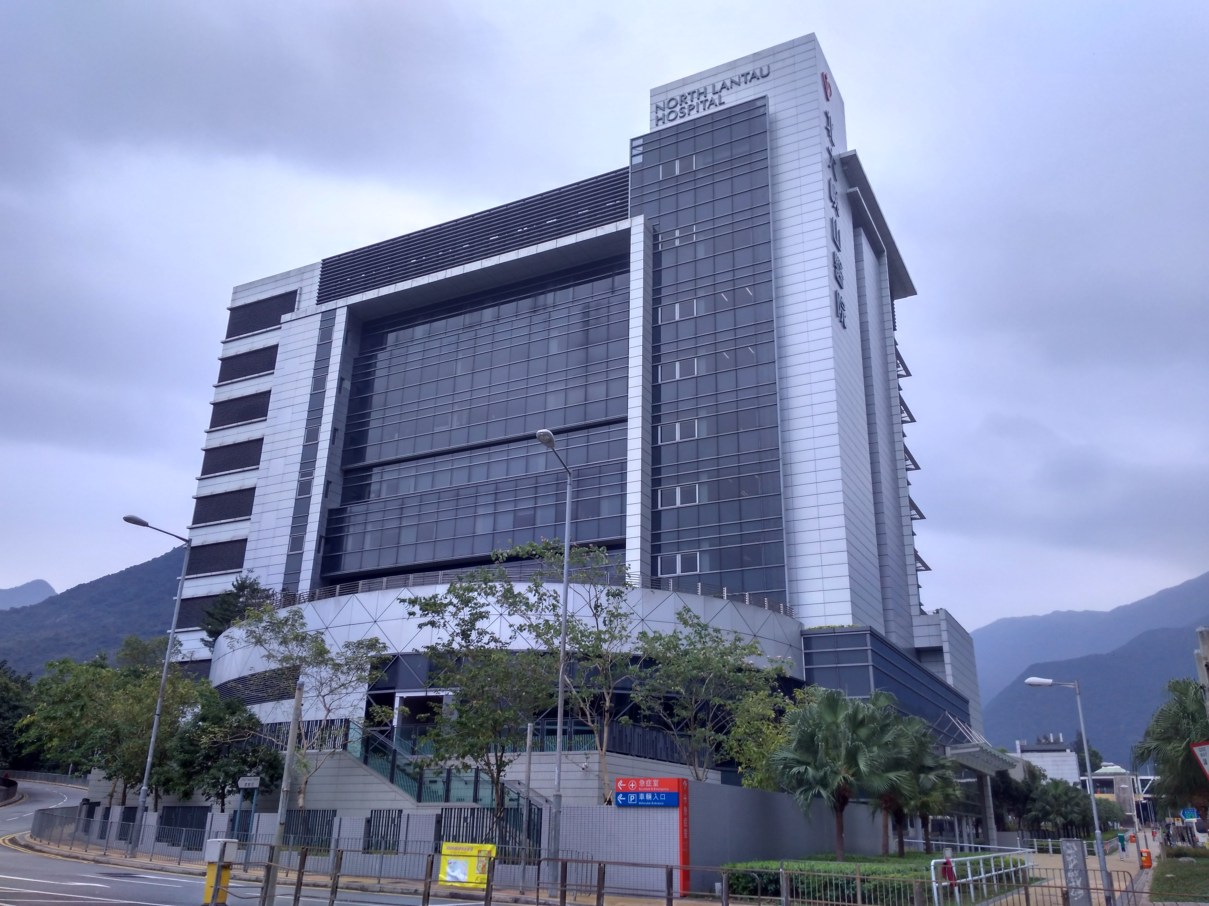 北大屿山医院